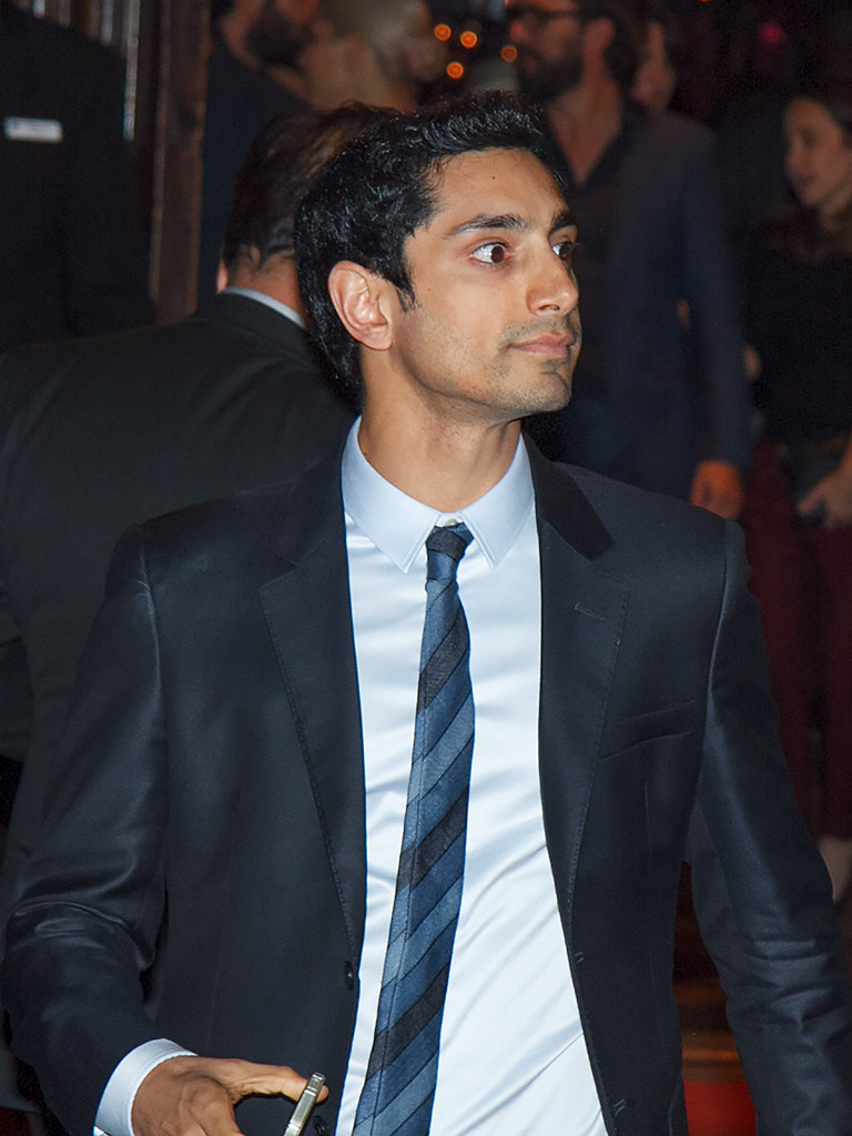 Toronto International Film Festival 2014